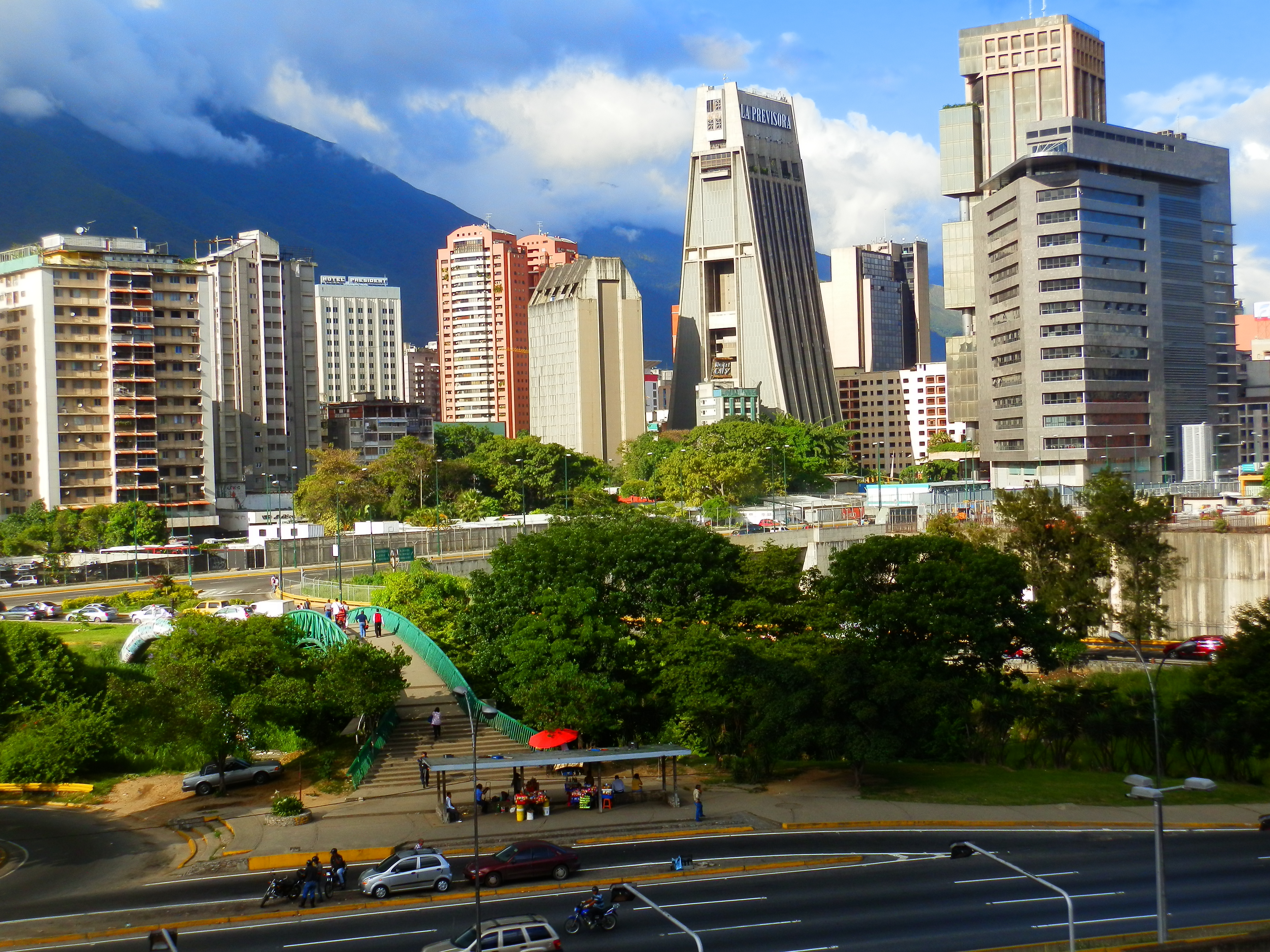 La Previsora, Torre Domus, y el panorama urbano de Caracas